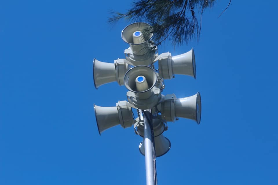 Tsunamiwarnsystem in Madohi, Dili